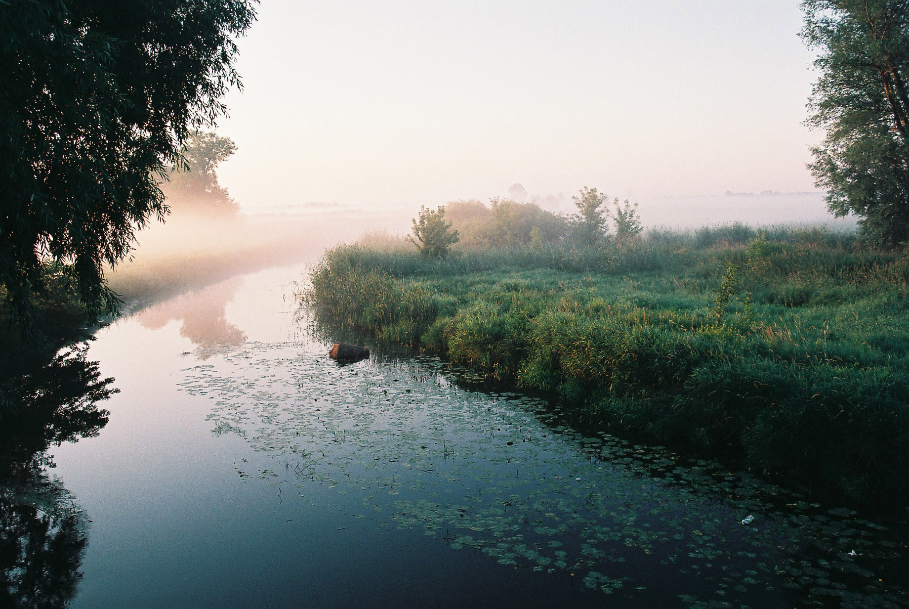 Dolina rzeki Tyśmienicy w okolicy wsi Niewęgłosz.